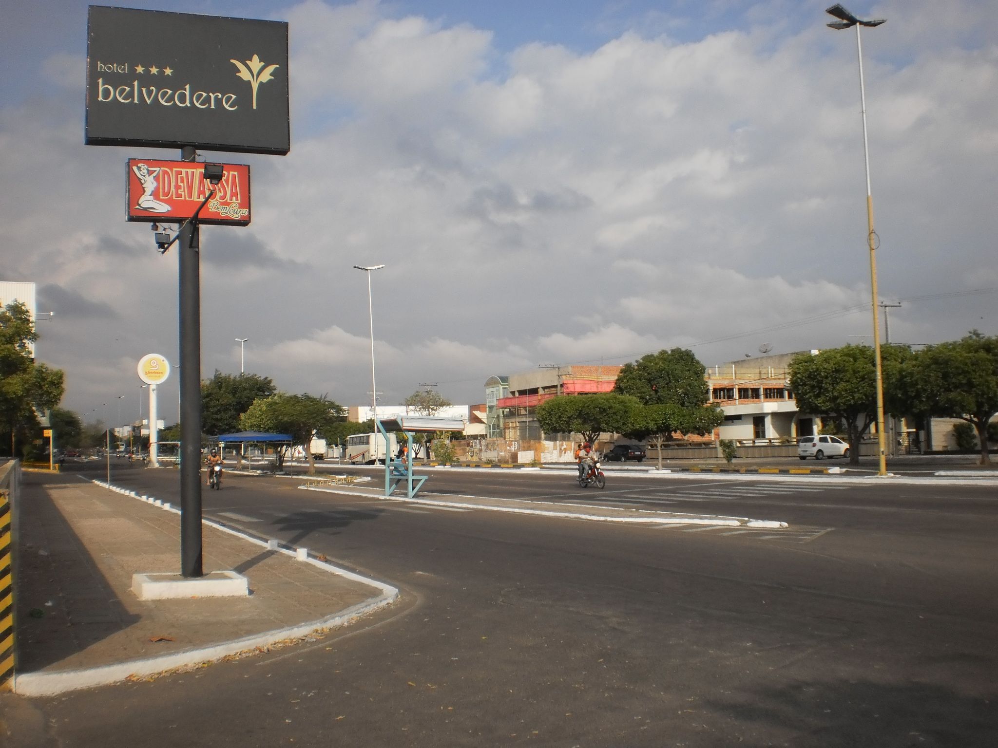 Avenida Apolônio Sales, em Paulo Afonso, Bahia, Brasil.